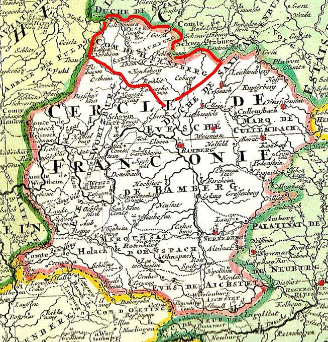 Karte "Deutschen Reichs - 1740 " Kupferstich von Jaillot b. Reinier & Josua Ottens Amsterdam - Ausschnitt Fränkischer Reichskreis